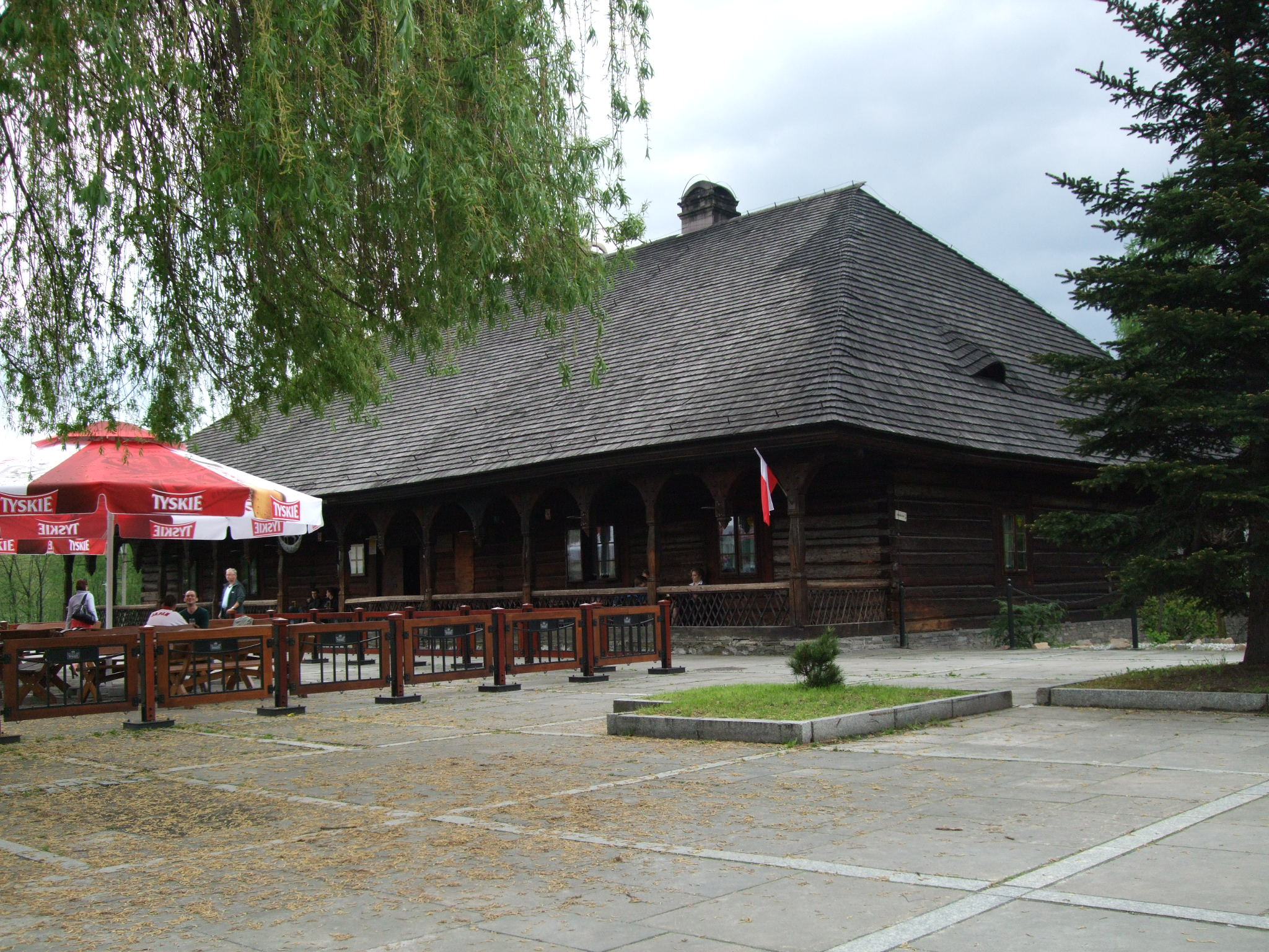 Karczma Rzym (XVIII wiek) znana z "Pani Twardowskiej" Adama Mickiewicza. Rynek w Suchej Beskidzkiej. Konstrukcja zrębowa, czterospadowy dach gontowy.